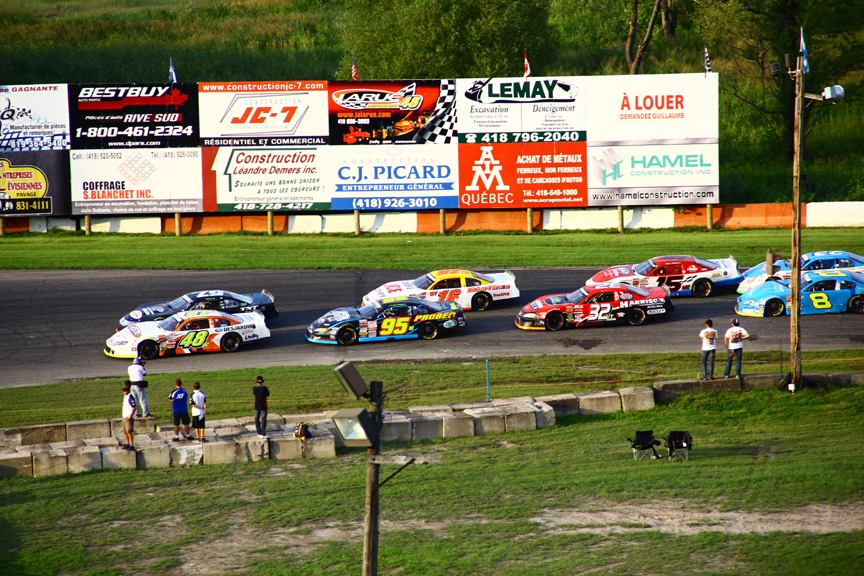 Course Can-Am 200 - Série ACT Castrol - 27 août 2011 - Photo Paul-Émile Poulin-Jacques